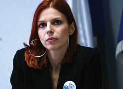 Генерални секретар СРС